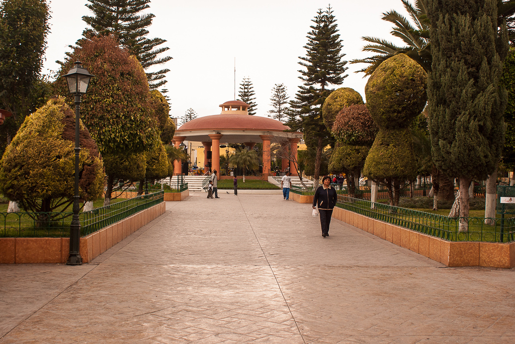 Centro de Actopan